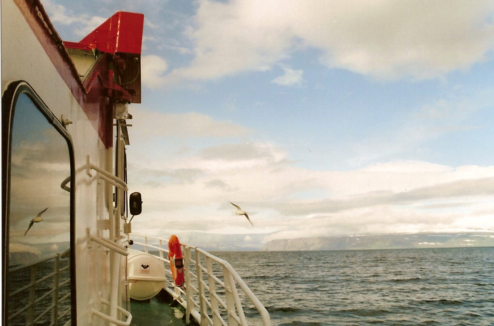 Fähre zur Halbinsel Hornstrandir auf dem Ísafjarðardjúp in den Westfjorden Islands